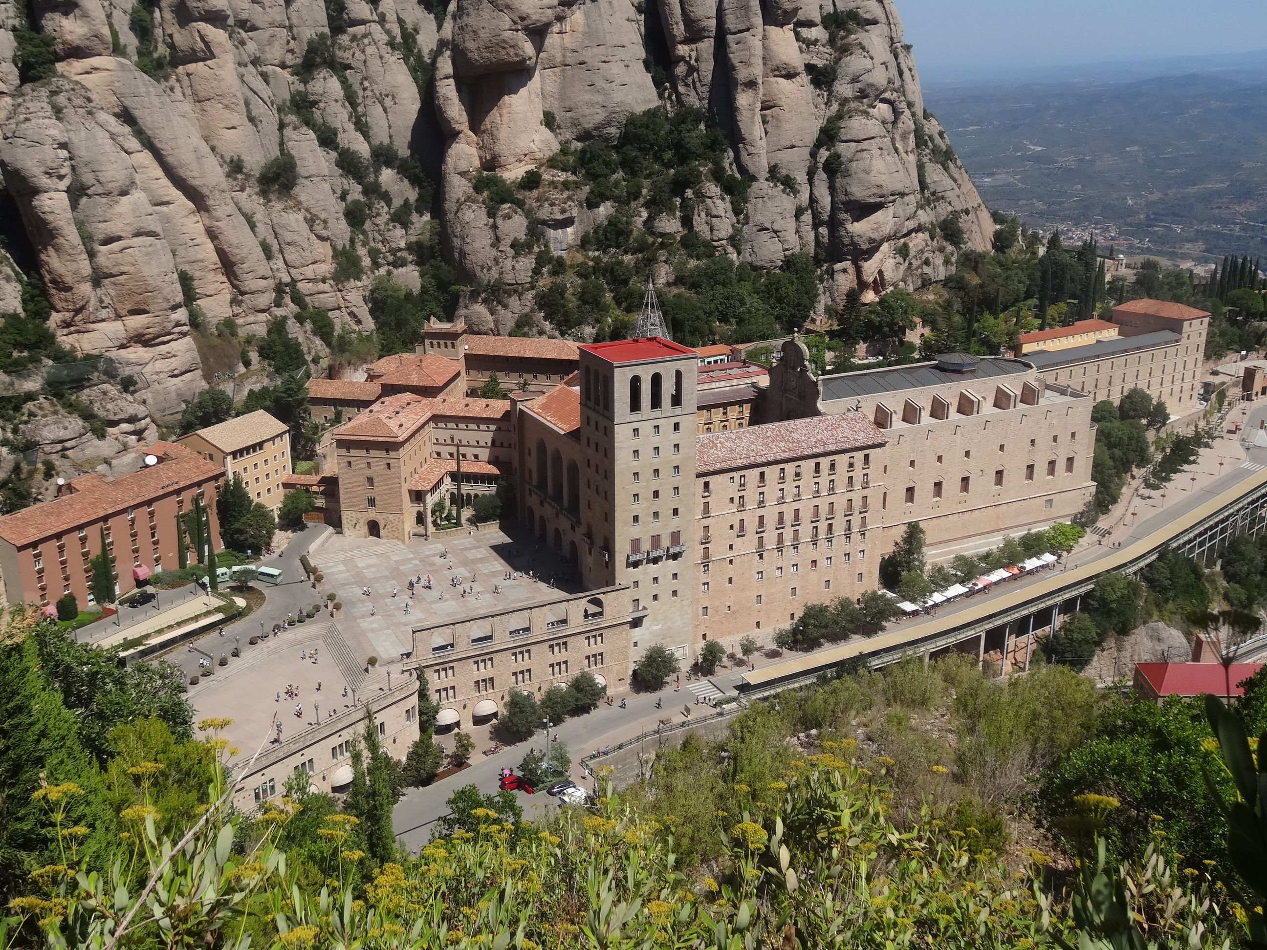 Muntanya de Montserrat. Vistes des de la Miranda de Fra Garí